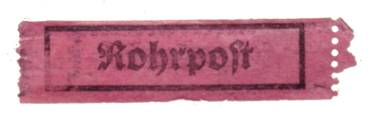 Aufkleber zur Kennzeichnung von Rohrpostsendungen in Berlin und München. Es ist nicht bekannt, ob diese Kleber auch in Postämtern außerhalb Berlins und Münchens vorrätig waren. Wegen der Vermutung, daß die hier verwendete Schwabacher Schrift (bisher immer als 'deutsche Schrift' aufgefaßt) im 18. Jahrhundert von einem Schriftschneider jüdischer Herkunft erfunden worden sei, verbot Hitler ab 1942 die Verwendung dieser Schrift. Daher wurden trotz der prekären Kriegslage neue Kleber mit einer Antiqua gedruckt, die aber kaum noch zum Einsatz kamen.